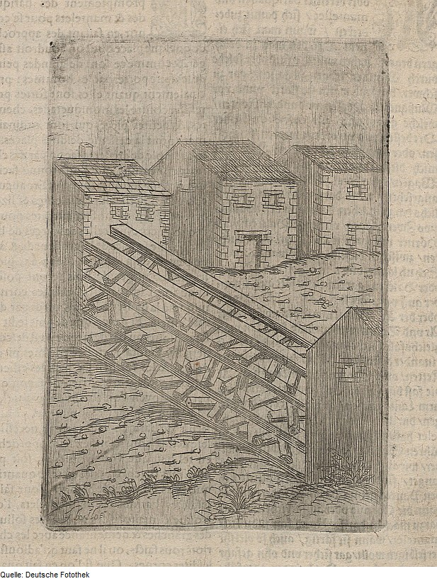 Original image description from the Deutsche Fotothek Kriegskunde & Barrikade